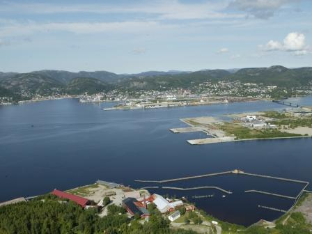 Norsk Sagbruksmuseum med Namsos i bakgrunnen.